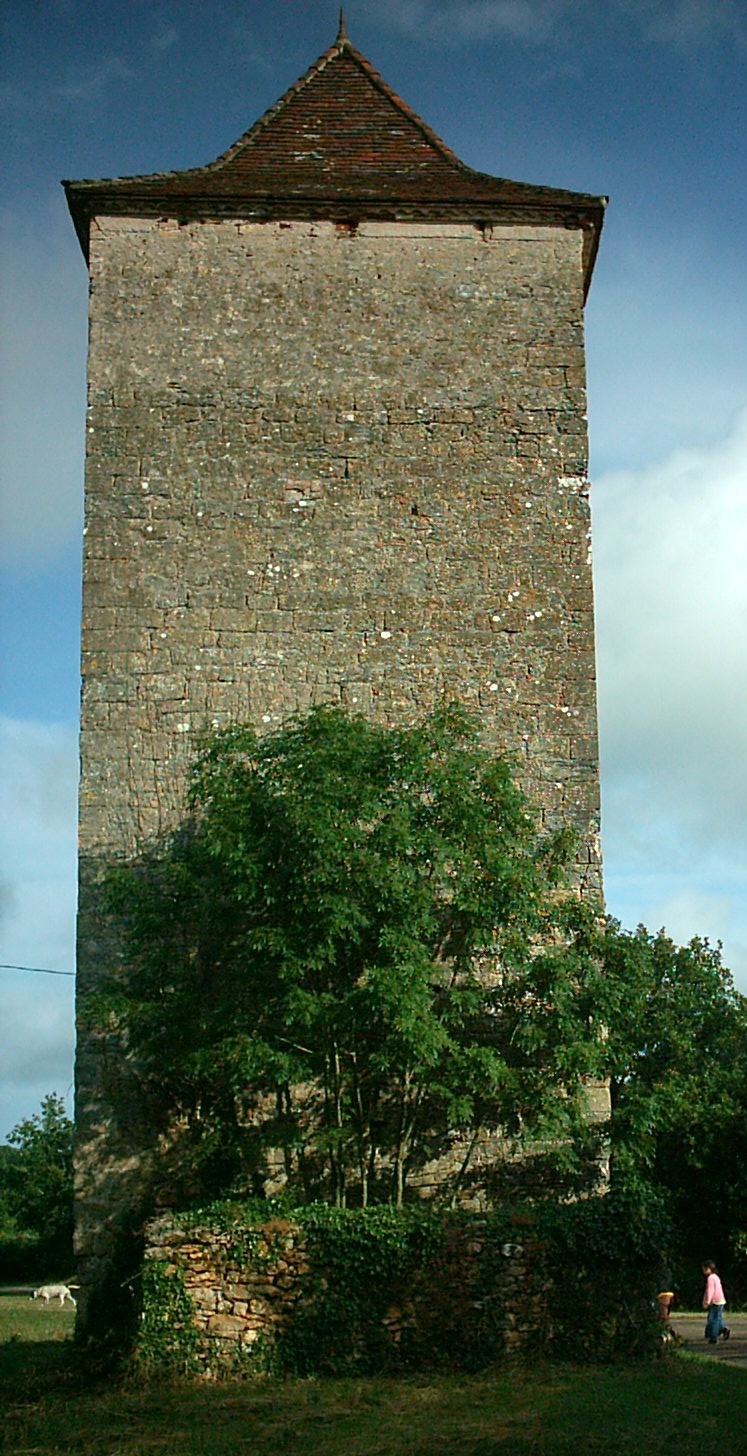 Tour située sur le Causse, lieu-dit Nougayrac, commune de Saint-Martin-Labouval Auteur : Vendenesse